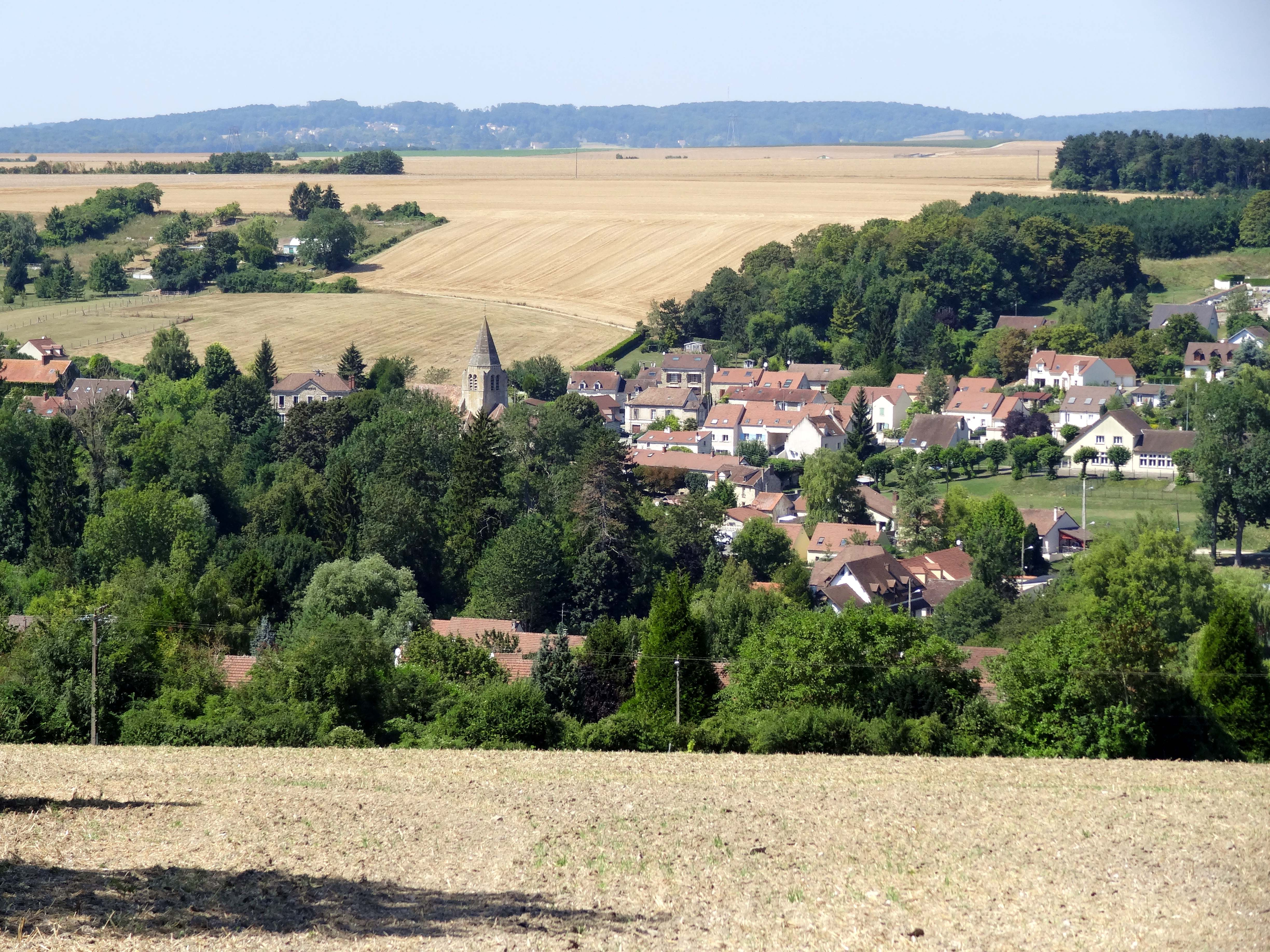 Église Saint-Nicolas de Tessancourt-sur-Aubette - voir titre.